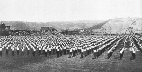 Maninská spartakiáda - červen 1921